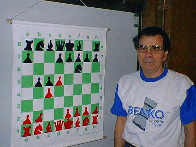 Pál Benkő (Original text: Pál Benkő)